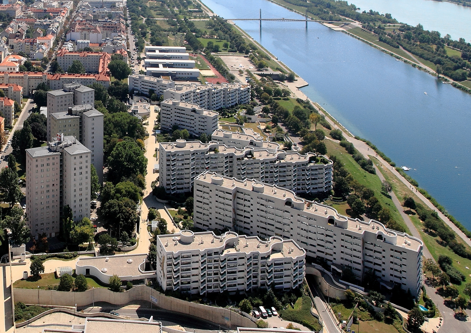 Wohnpark Neue Donau in Wien. Nach Plänen des Architekten Harry Seidler errichtet.